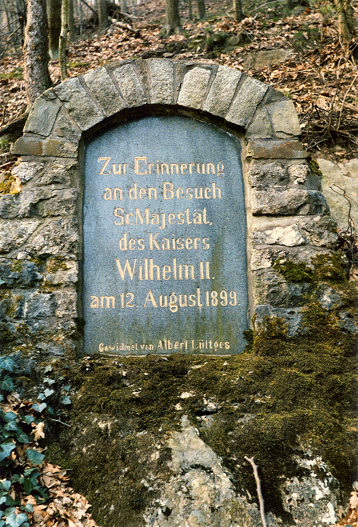 Gedenkstein «Zur Erinnerung an den Besuch Sr. Majestät des Kaisers Wilhelm II.» an der Müngstener Brücke am 12. August 1899